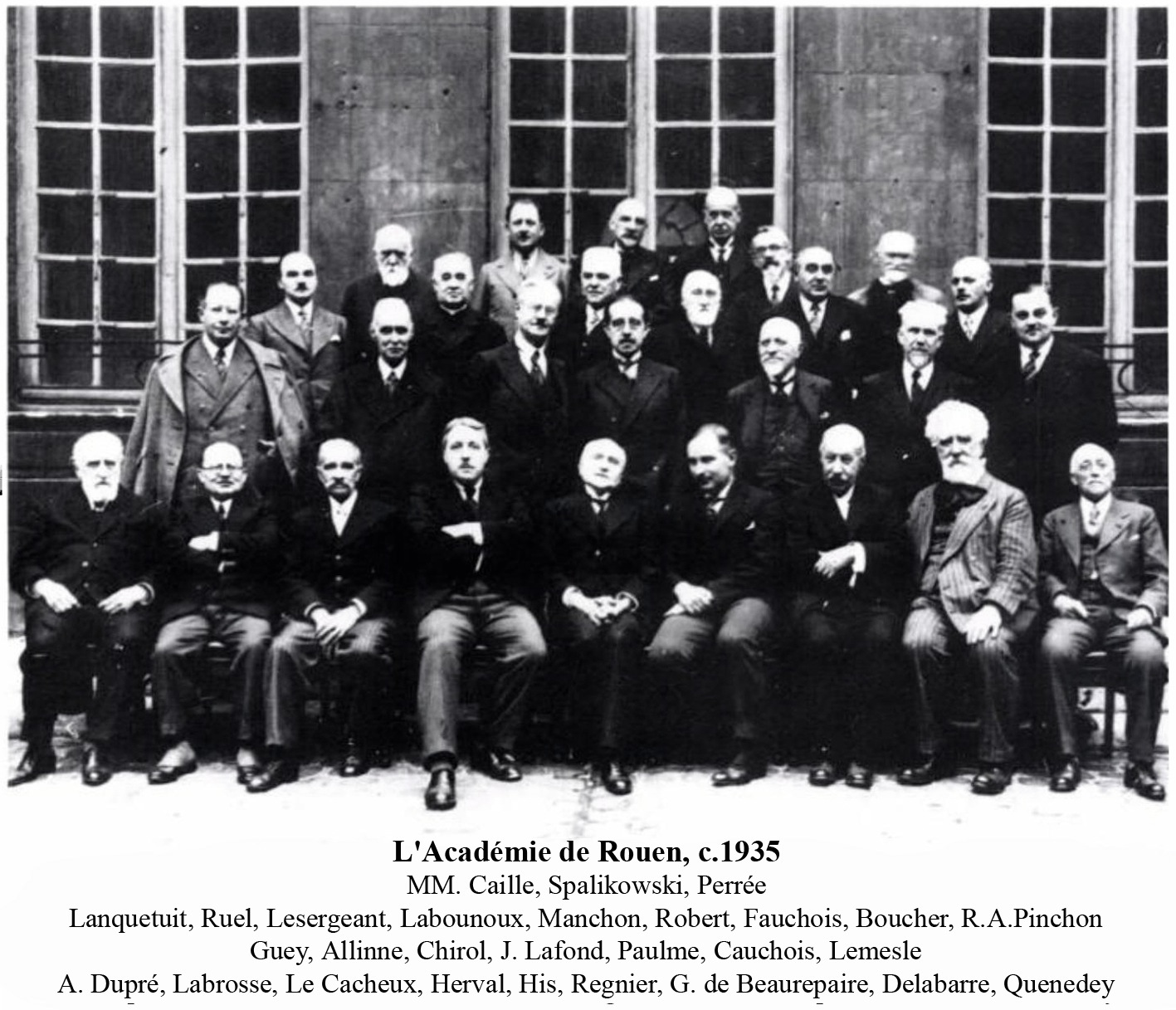 L'Académie de Rouen c.1935, Robert Antoine Pinchon, third row, right